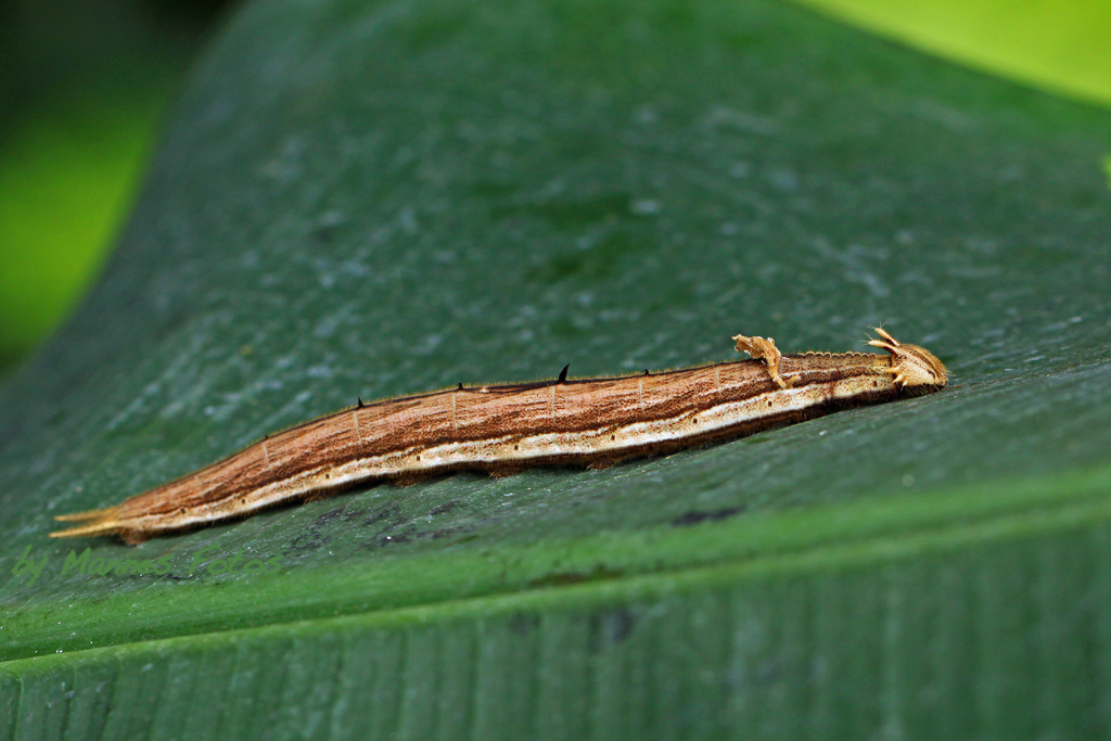 Die Aufnahme der Raupe des Bananenfalters entstand in Trassenheide Insel Usedom